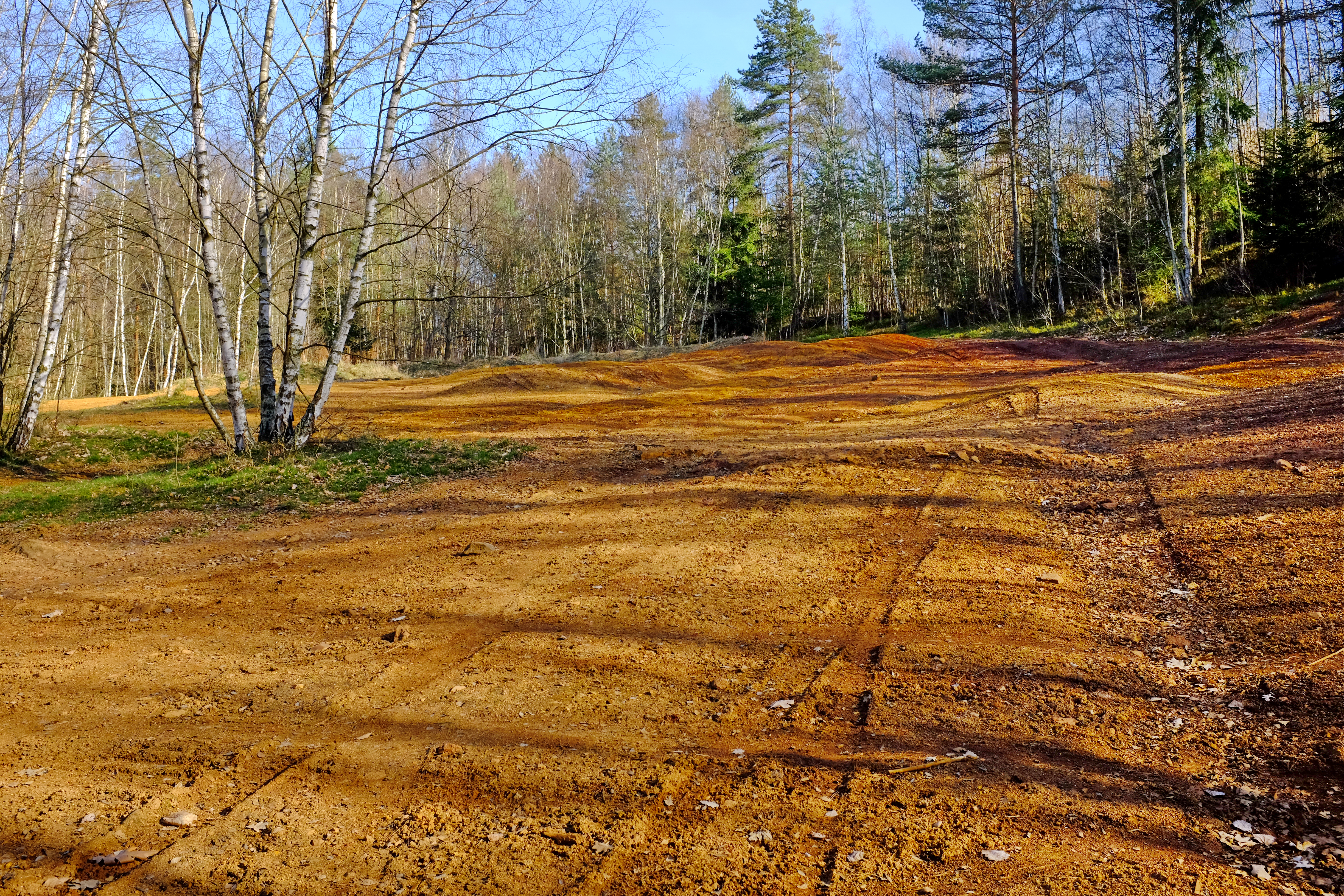 Pozůstaky po louhování v bývalém minerálním závodě Svaté Trojice ve Starém Sedle, okres Sokolov